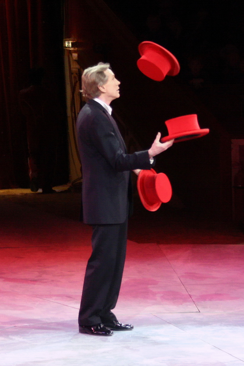 KRIS KREMO Jongleur aus der Schweiz.